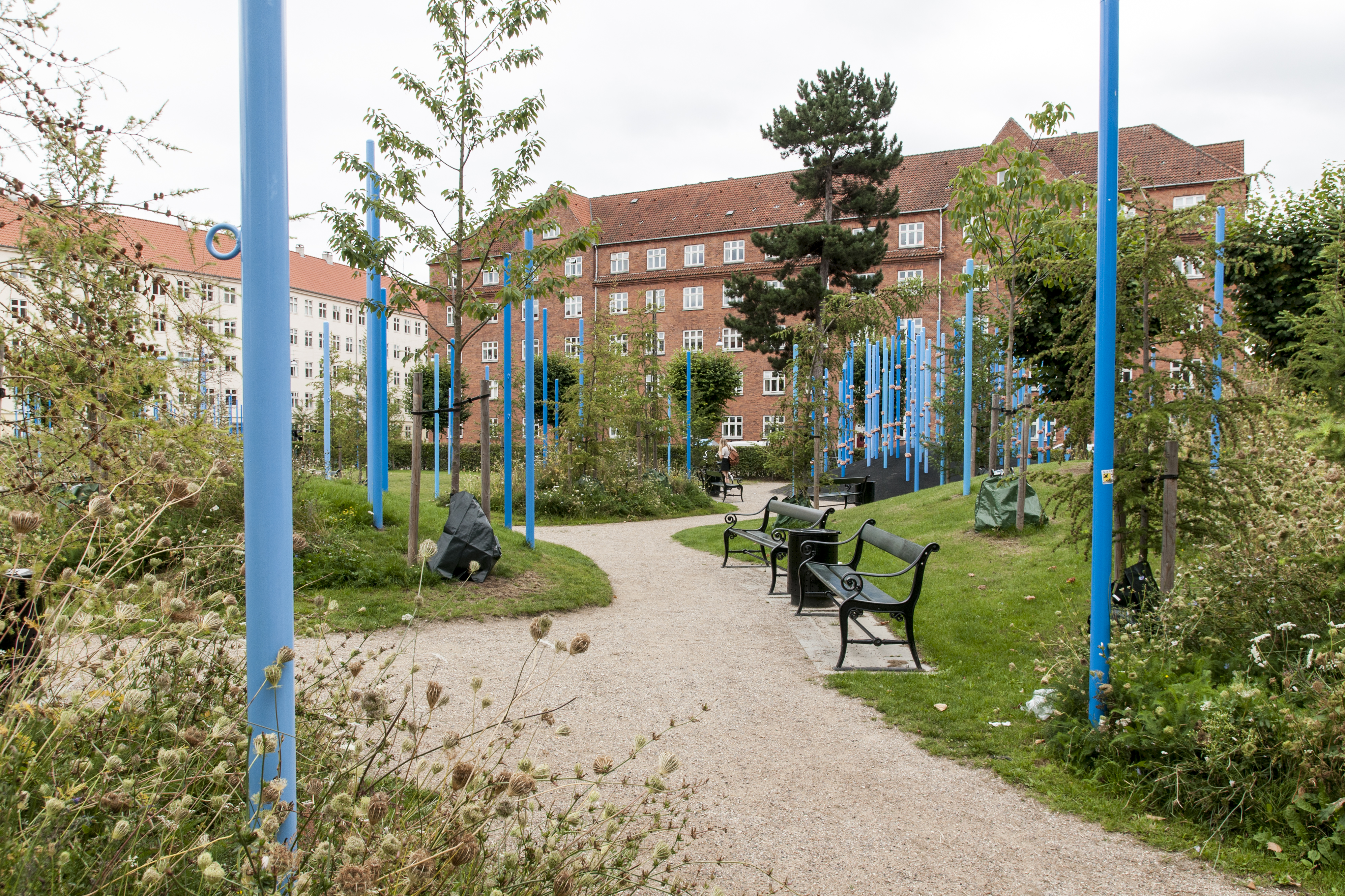 Guldbergs Plads in Copenhagen, Denmark